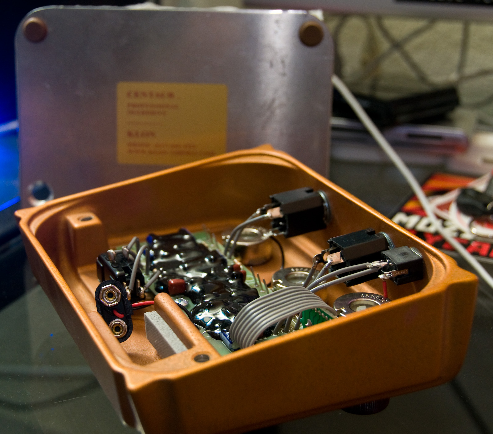 Klon Centaur - Internal view